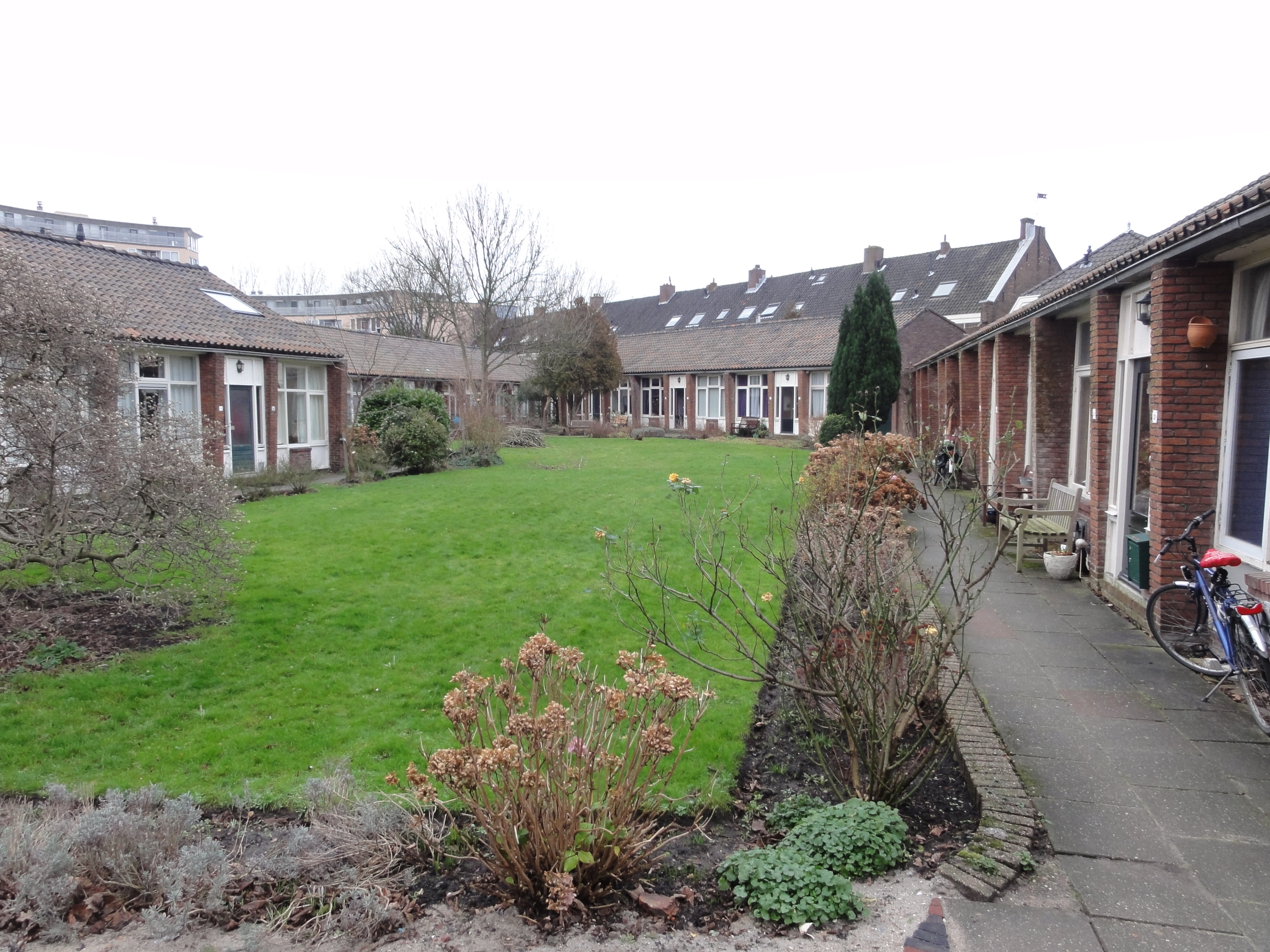 Paviljoenshof achter de Kroonvilla aan de Stationsweg 25 te Leiden